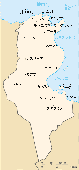 チュニジアの地図に主要な都市の位置と名前を日本語で記載したもの